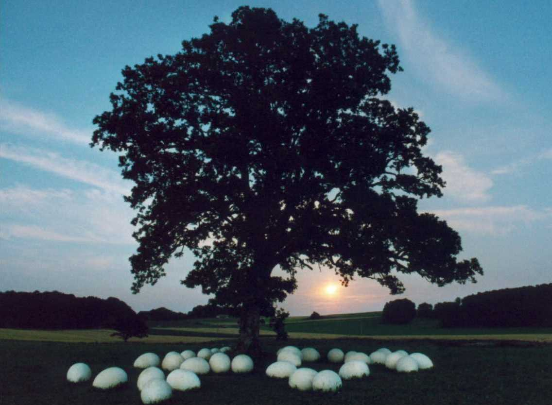 alb-eier